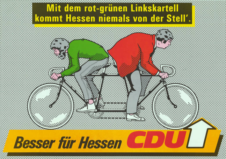 Mit dem rot-grünen Linkskartell kommt Hessen niemals von der Stell'. Besser für Hessen CDU Abbildung: Grüner und roter Radfahrer fahren zugleich auf einem gemeinsamen Fahrrad in entgegengesetzte Richtungen (Grafik) Plakatart: Motiv-/Textplakat Objekt-Signatur: 10-007 : 638 Bestand: Landtagswahlplakate Hessen (10-007) GliederungBestand10-18: Landtagswahlplakate Hessen (10-007) » CDU Lizenz: KAS/ACDP 10-007 : 638 CC-BY-SA 3.0 DE